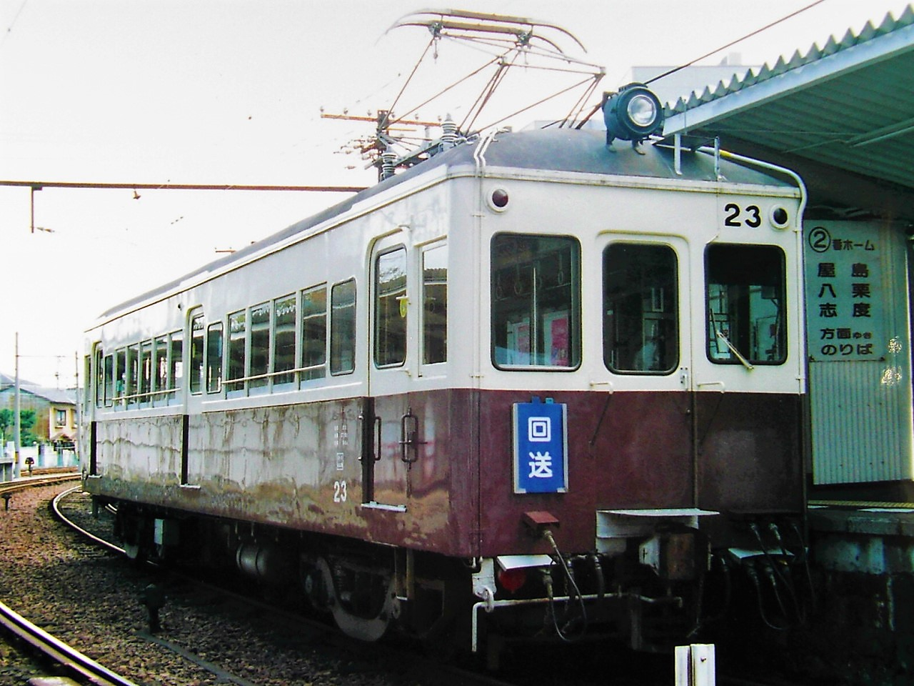 高松琴平電気鉄道20形23号